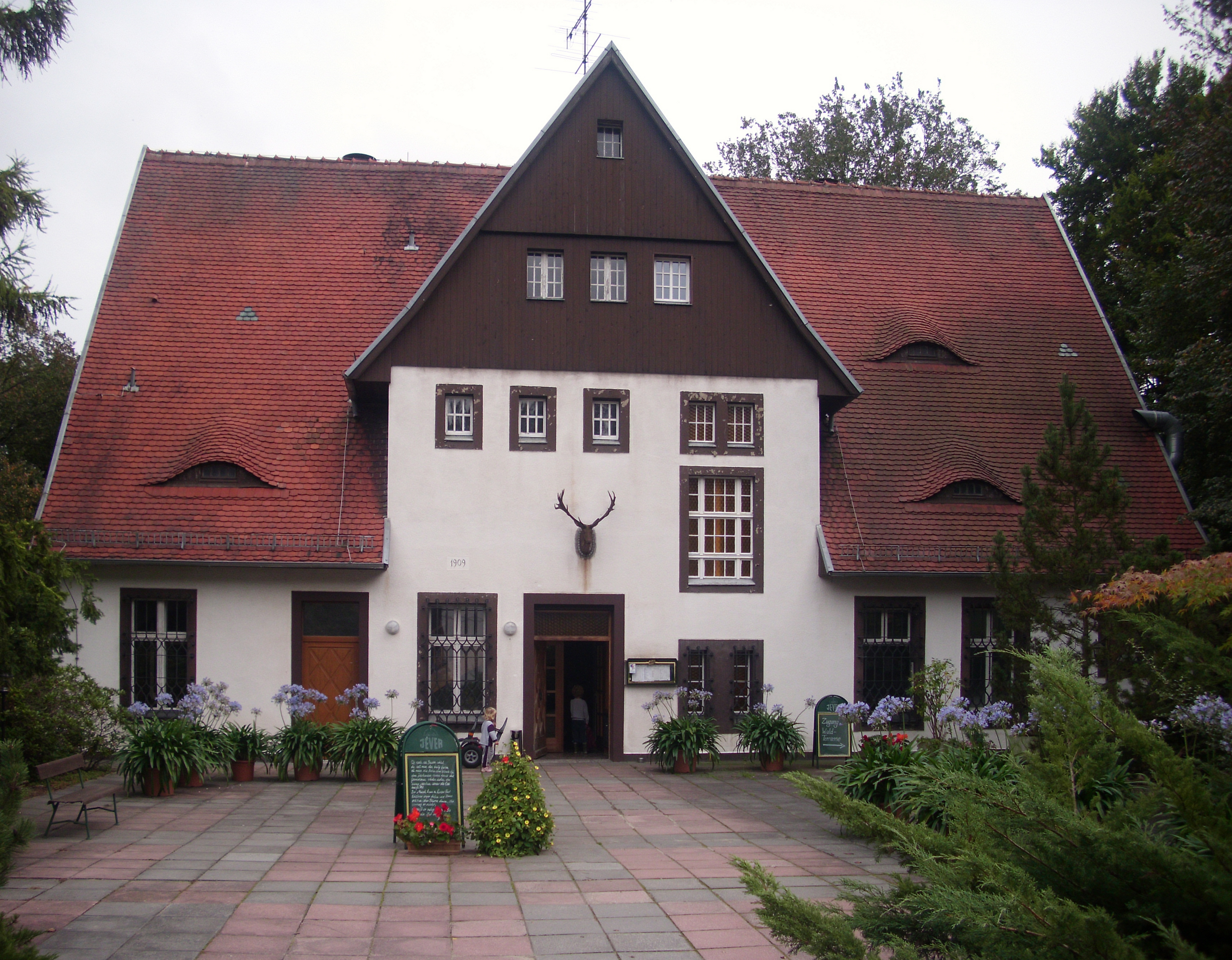 Herrenhaus, heute Hotel, Siehdichum, Brandenburg